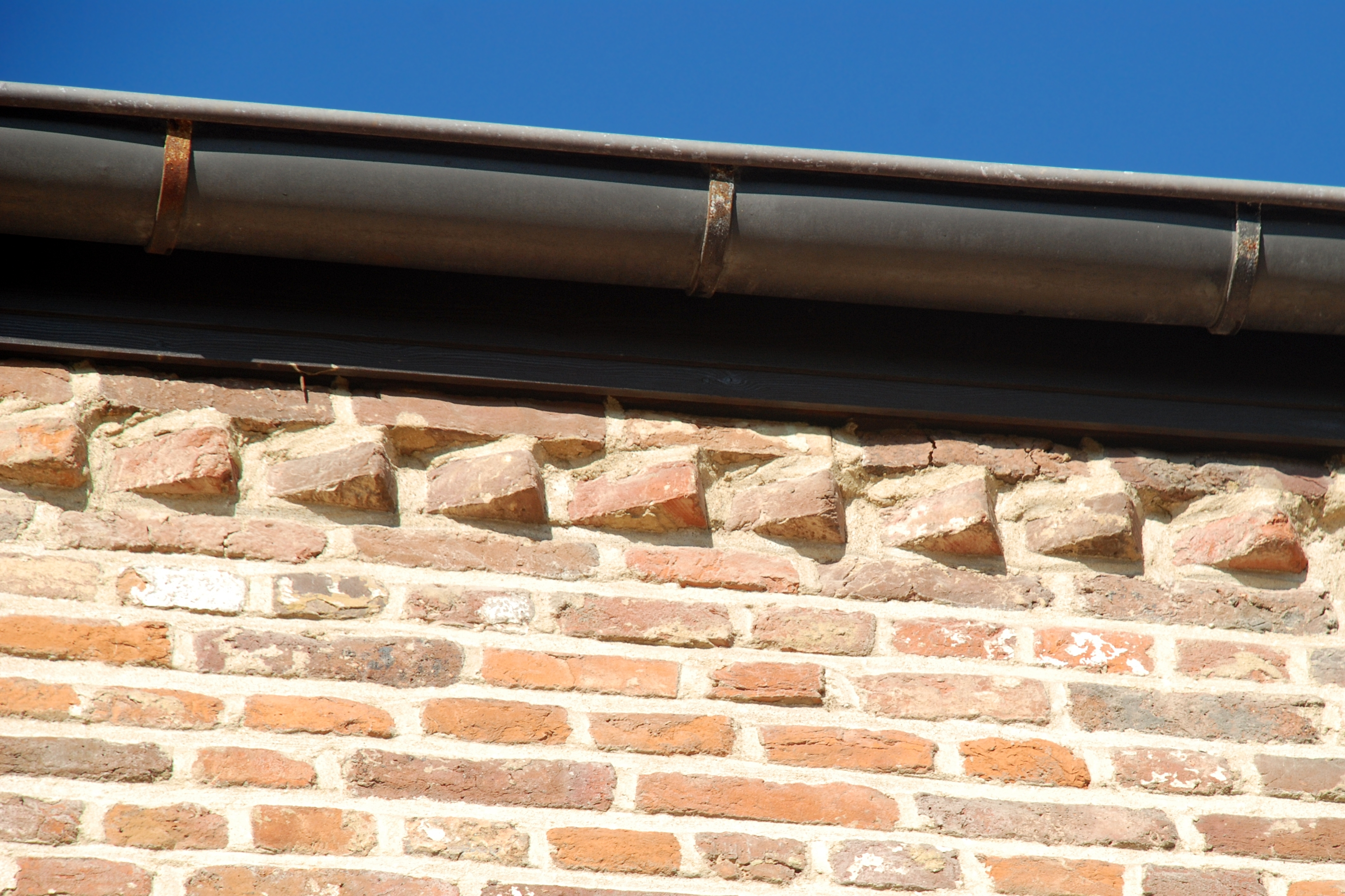 Belgique - Wallonie - Ottignies - Ferme du Douaire